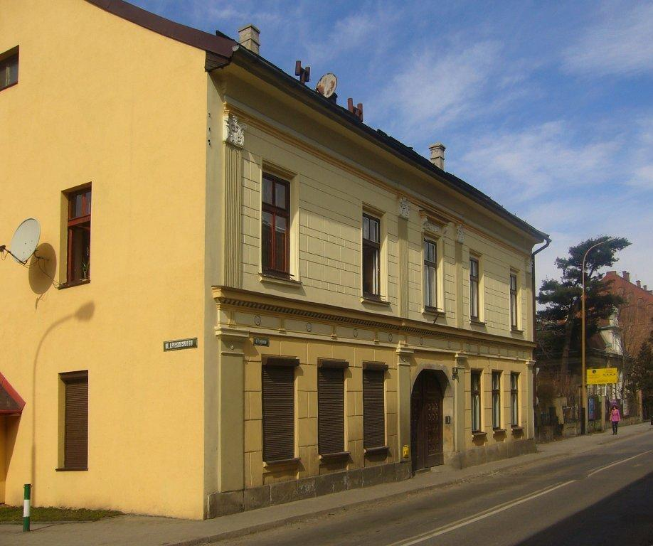 Bielsko-Biała, Legionów 17 – kamienica Strzygowskich (dom rodzinny Herthy Karasek-Strzygowski), ob. Centrum Pomocy św. Brata Alberta.